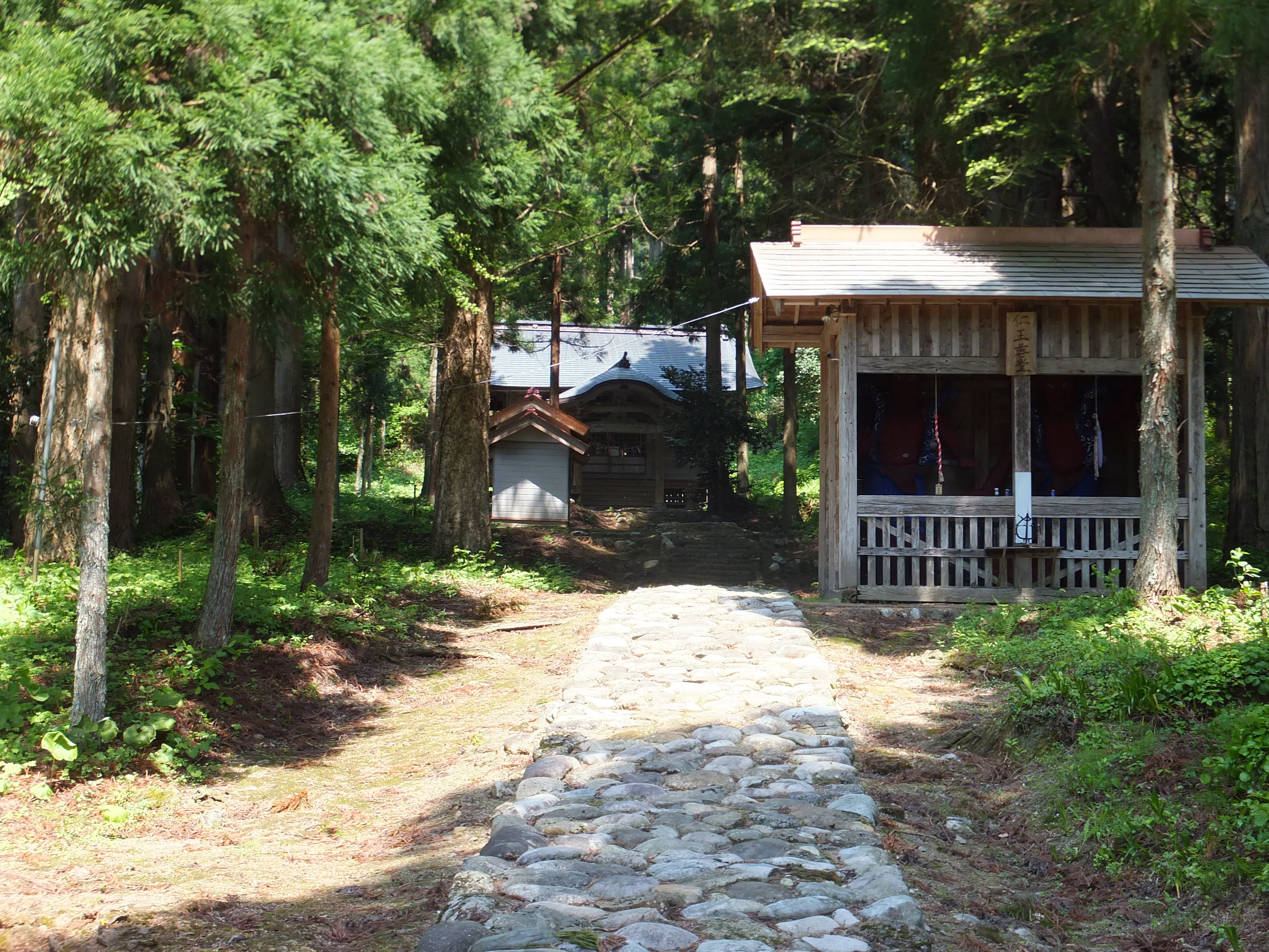 藤倉神社（秋田市山内）